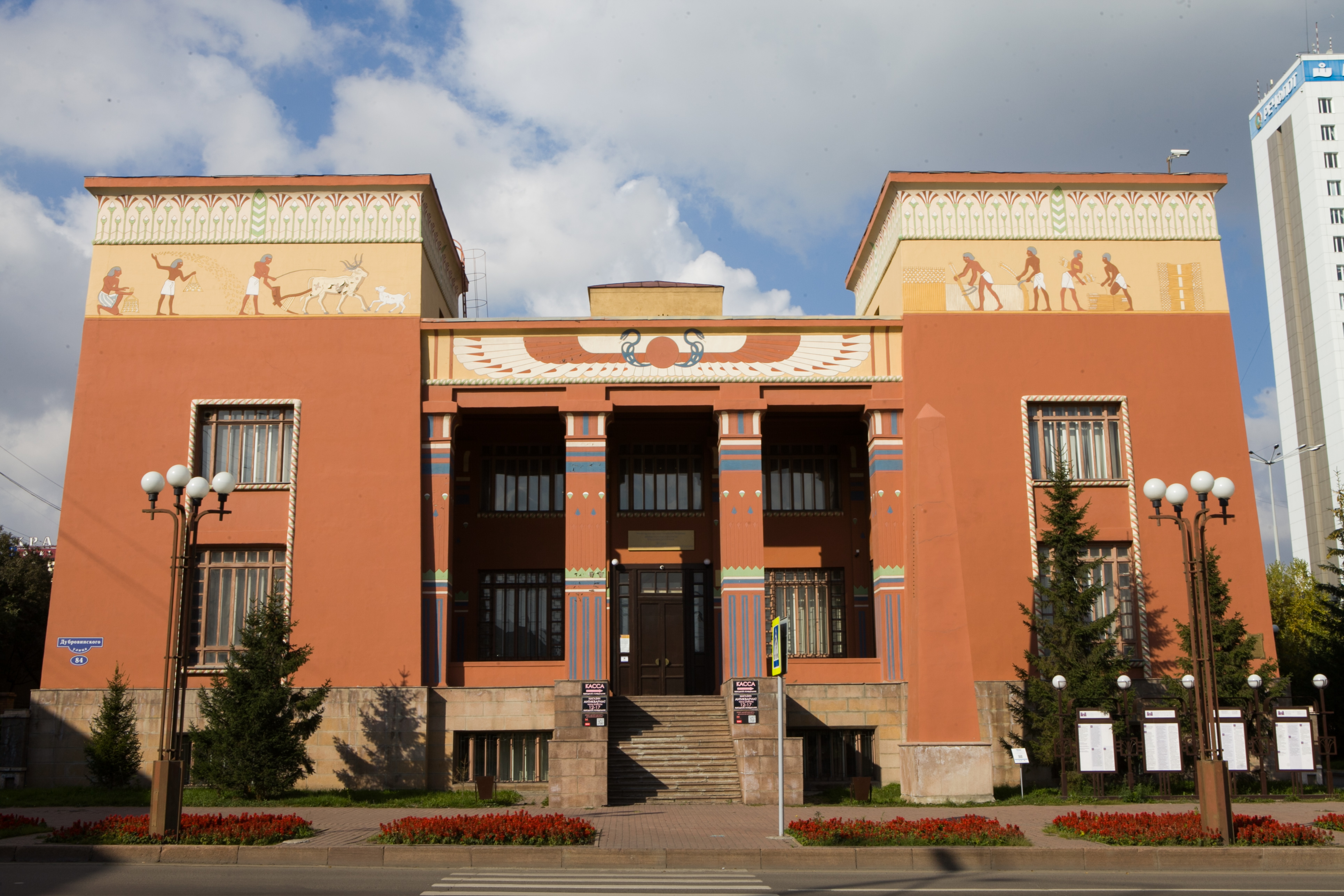 Музей краеведческий: улица Дубровинского, 84, Красноярск, Красноярский край